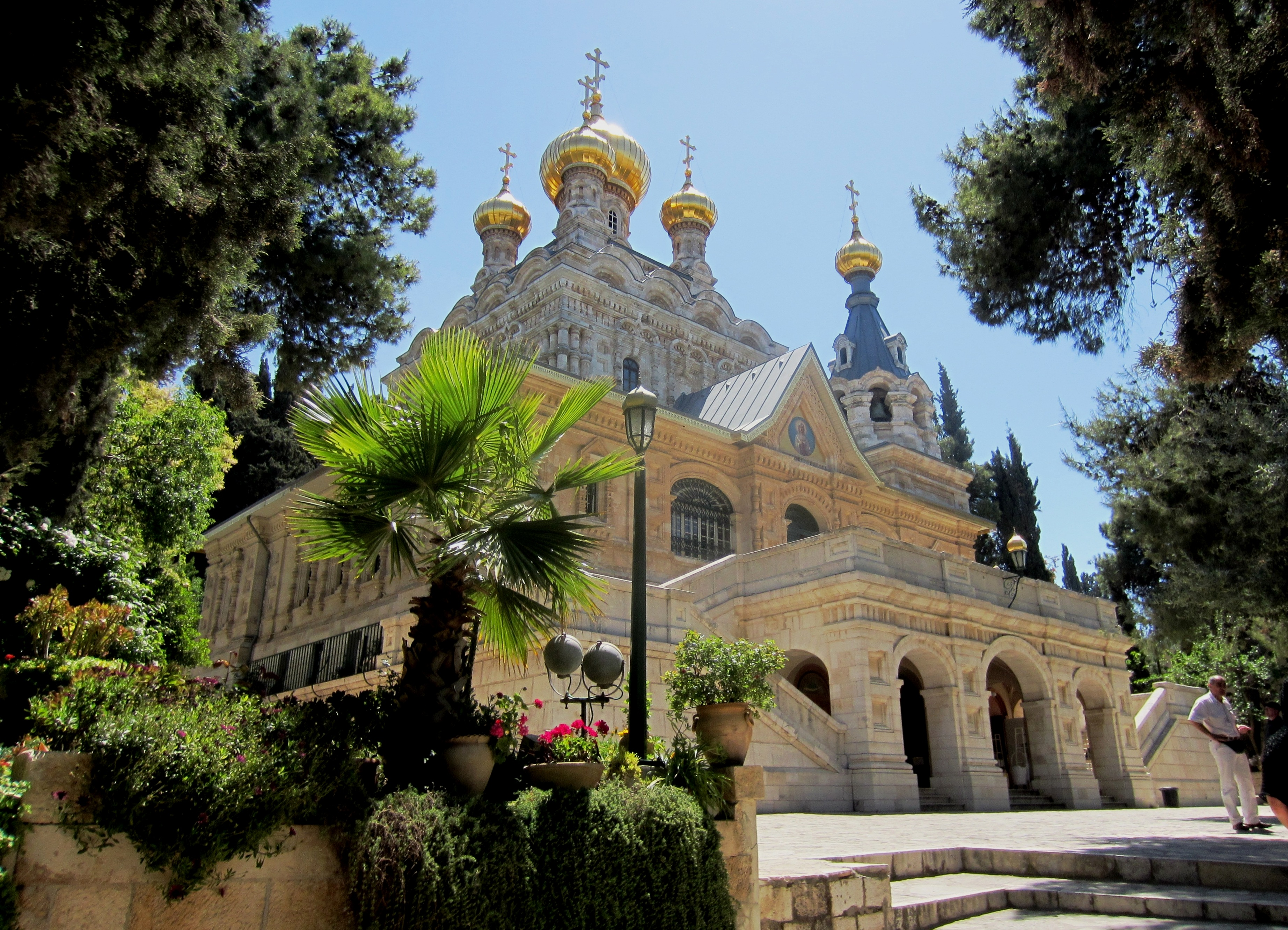 Die russisch-othodoxe Magdalenenkirche am Ölberg, Jerusalem